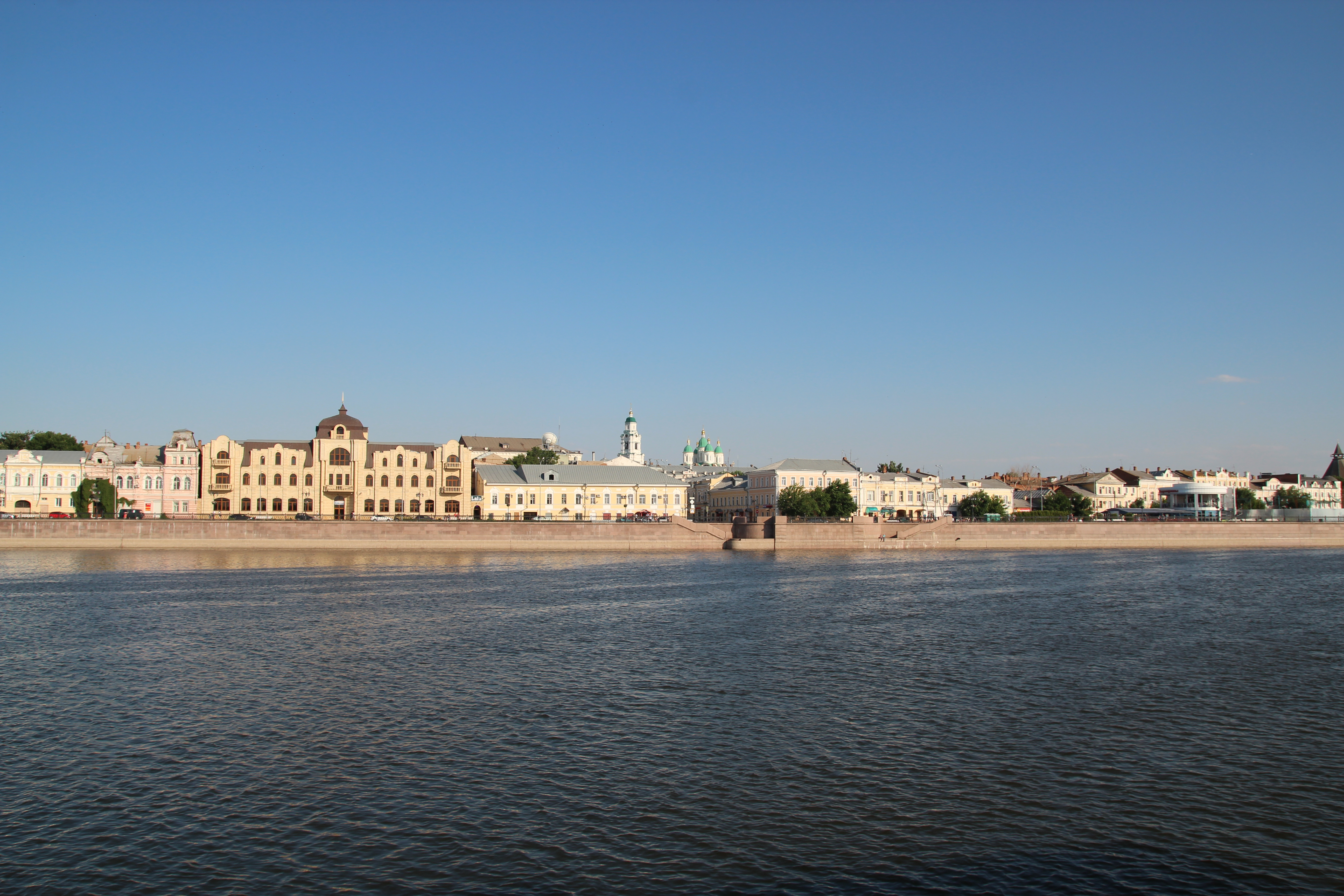 Набережная Волги: улица Максима Горького / улица Анатолия Сергеева, Астрахань, Астраханская область